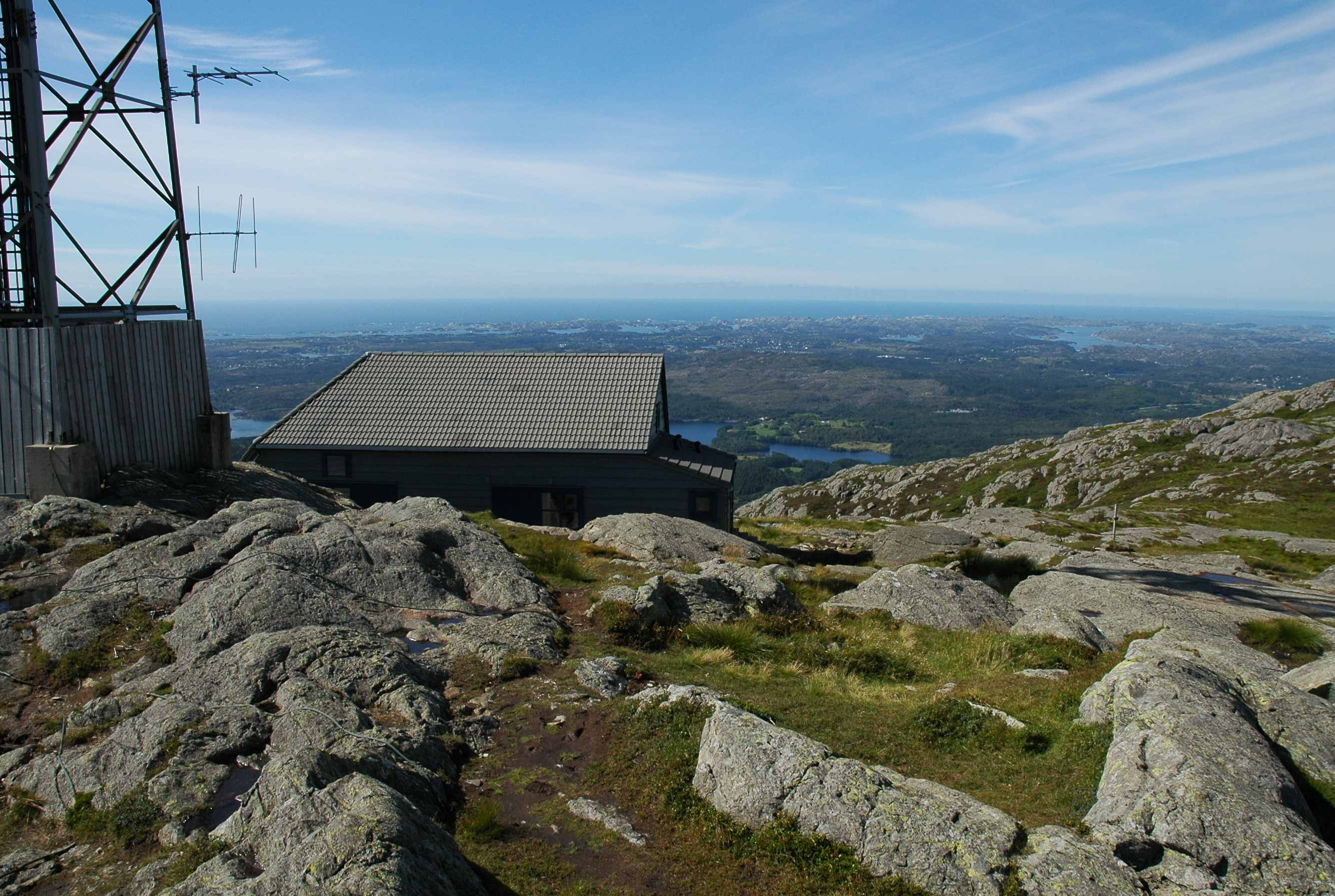 Televerkhytten med utsikt mot vest.